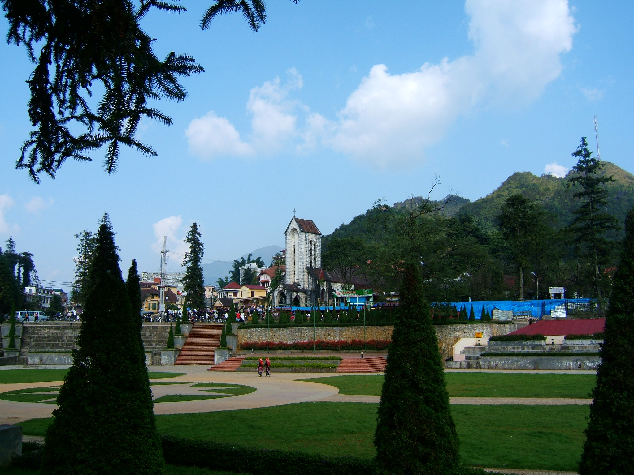 Sa Pa center